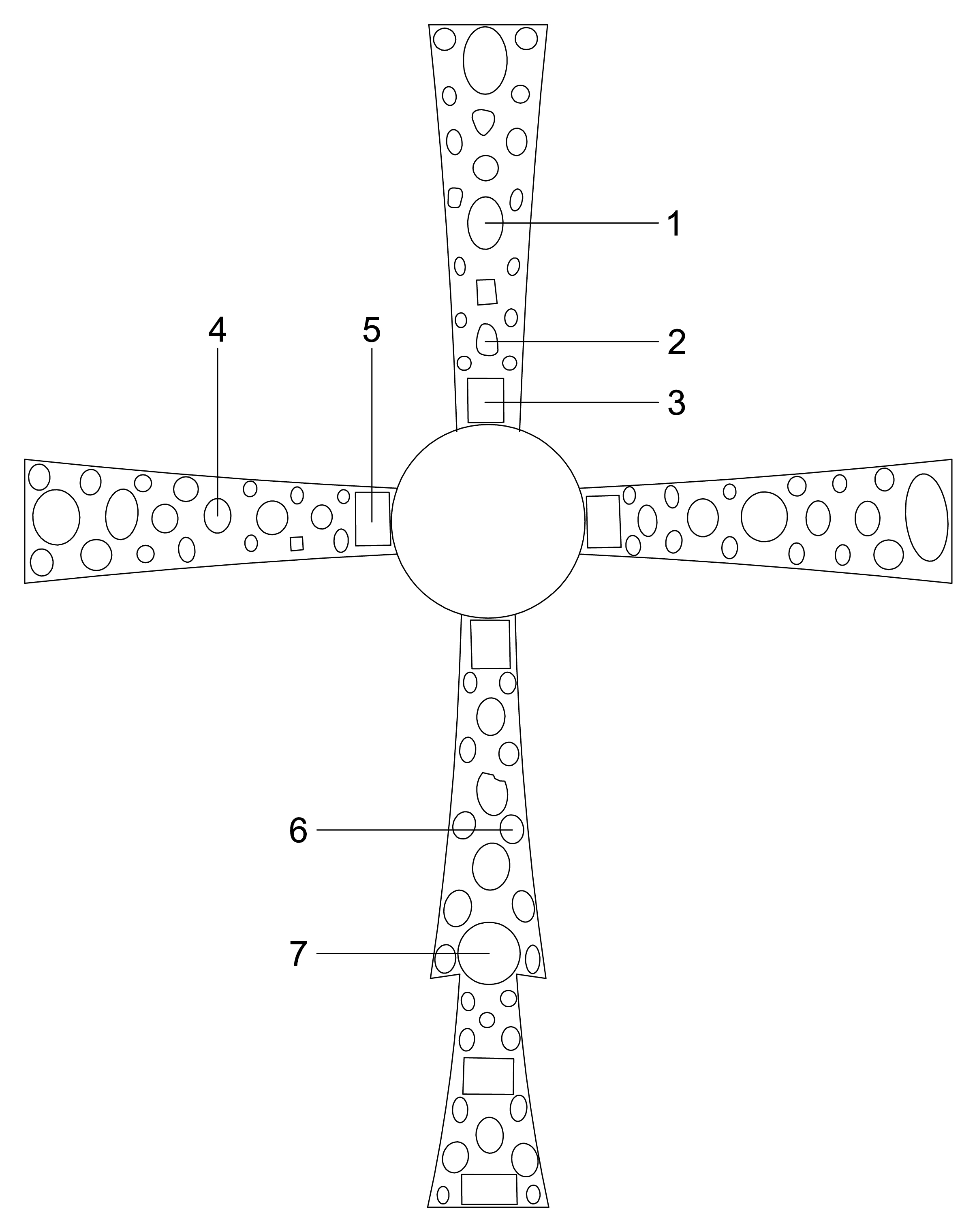 Croce di Desiderio, IX secolo, museo di Santa Giulia, Brescia (restituzione grafica)